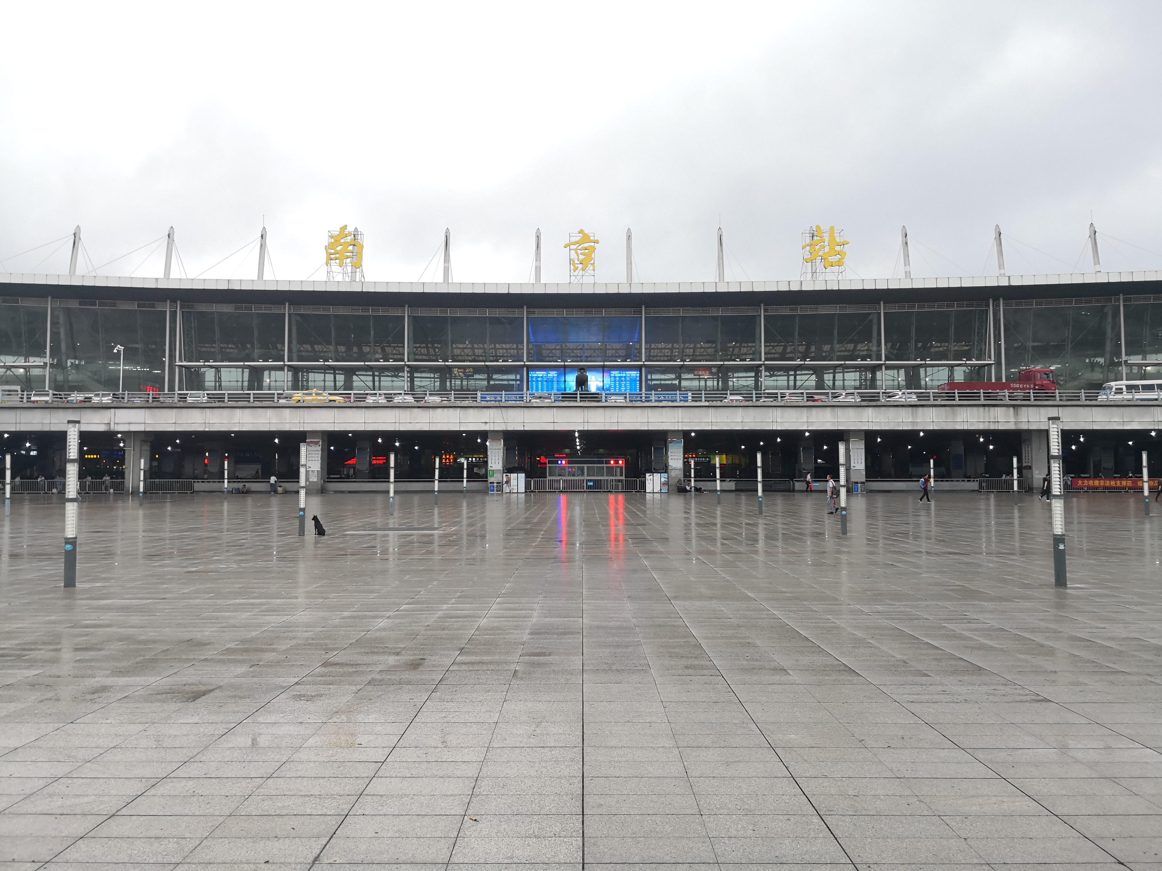 南京站南站房